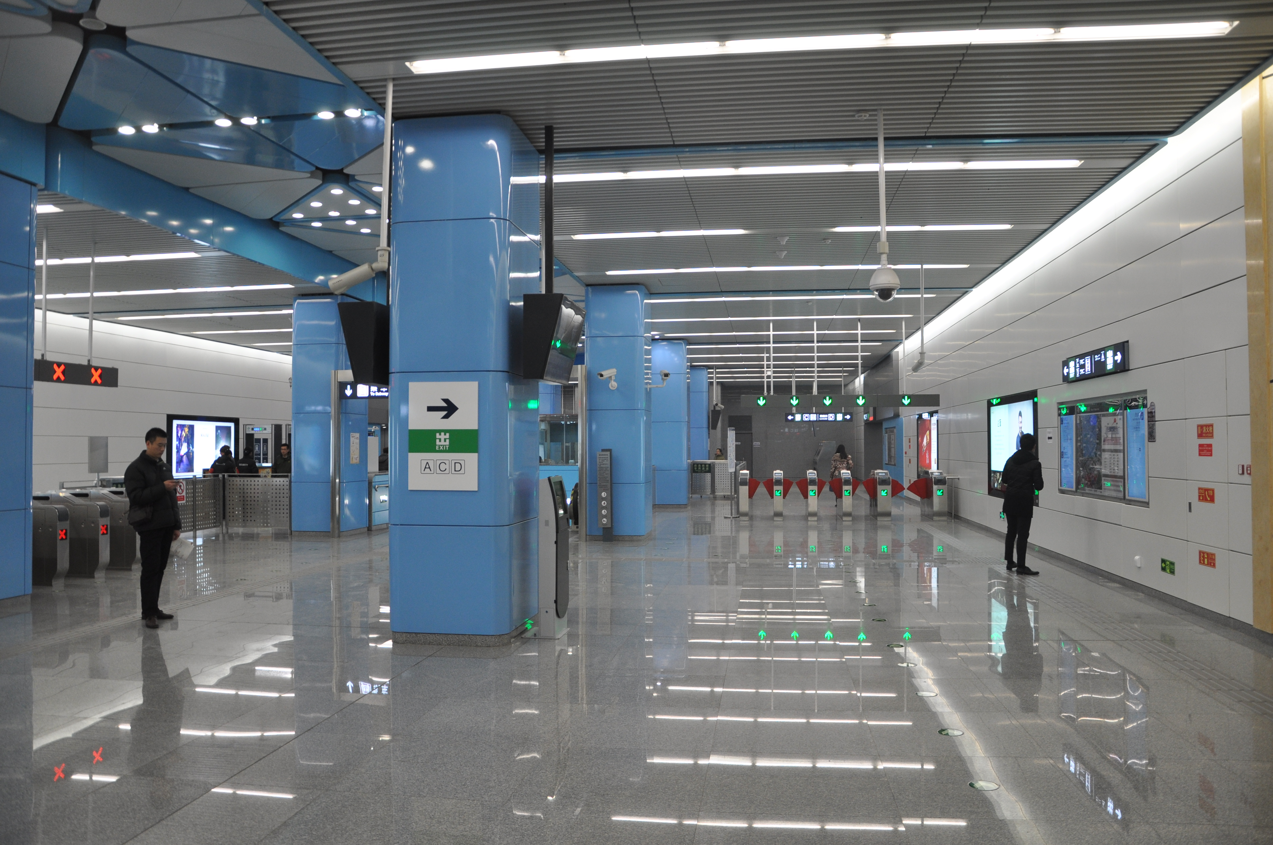 北京地铁14号线北工大西门站站厅